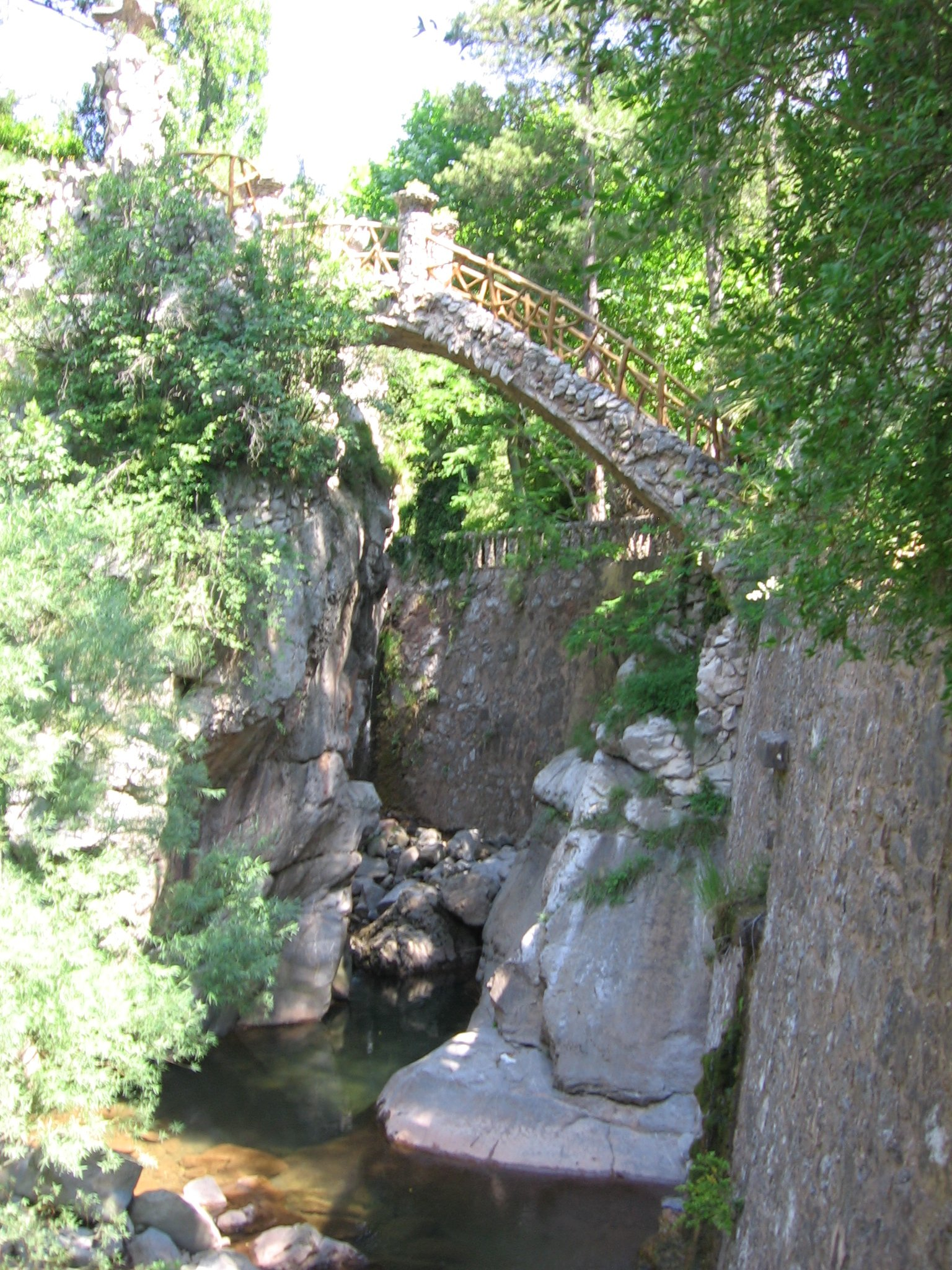 Jardines de Can Artigas, La Pobla de Lillet (Barcelona)